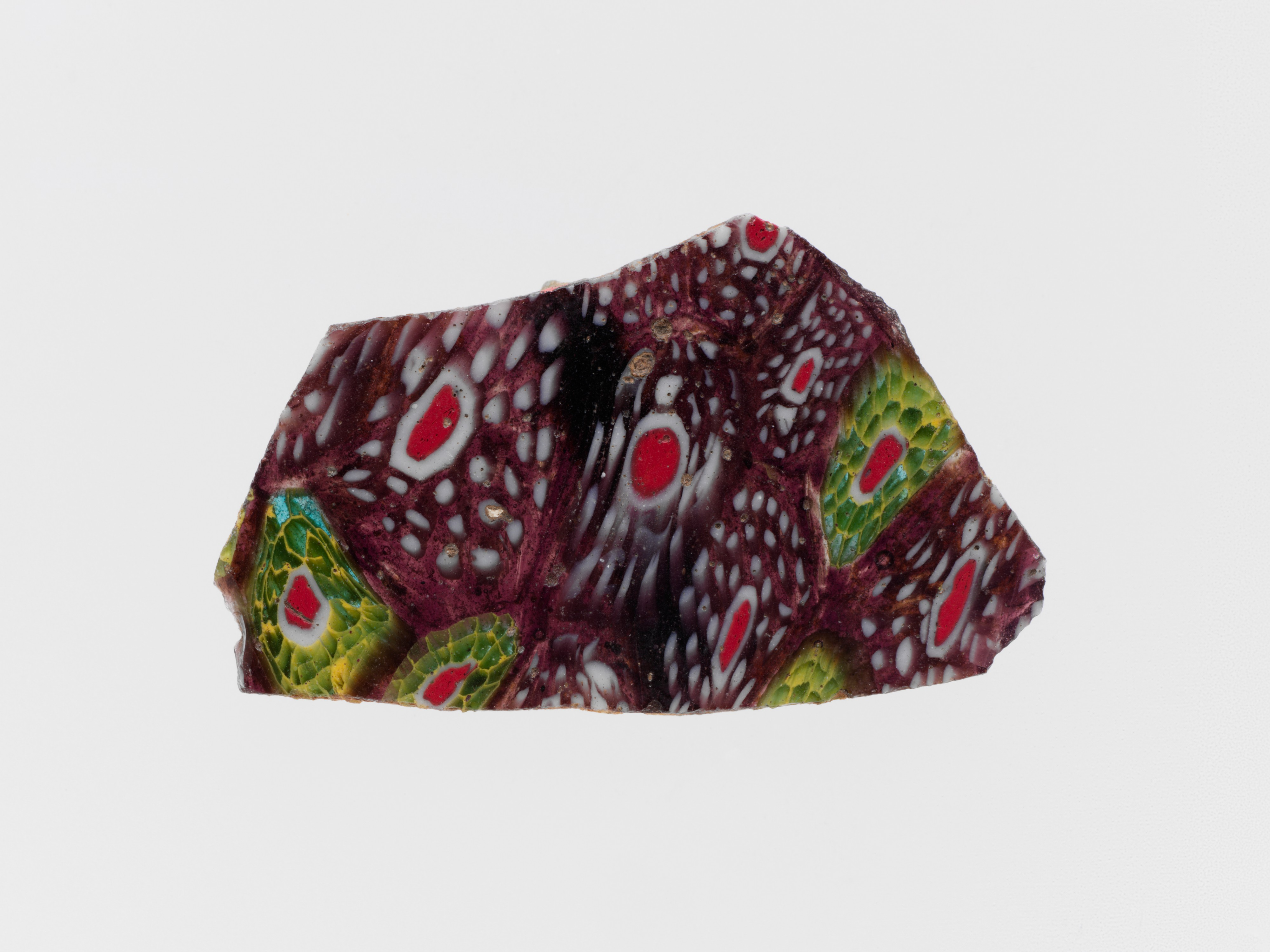 Roman; Mosaic glass fragment; Glass